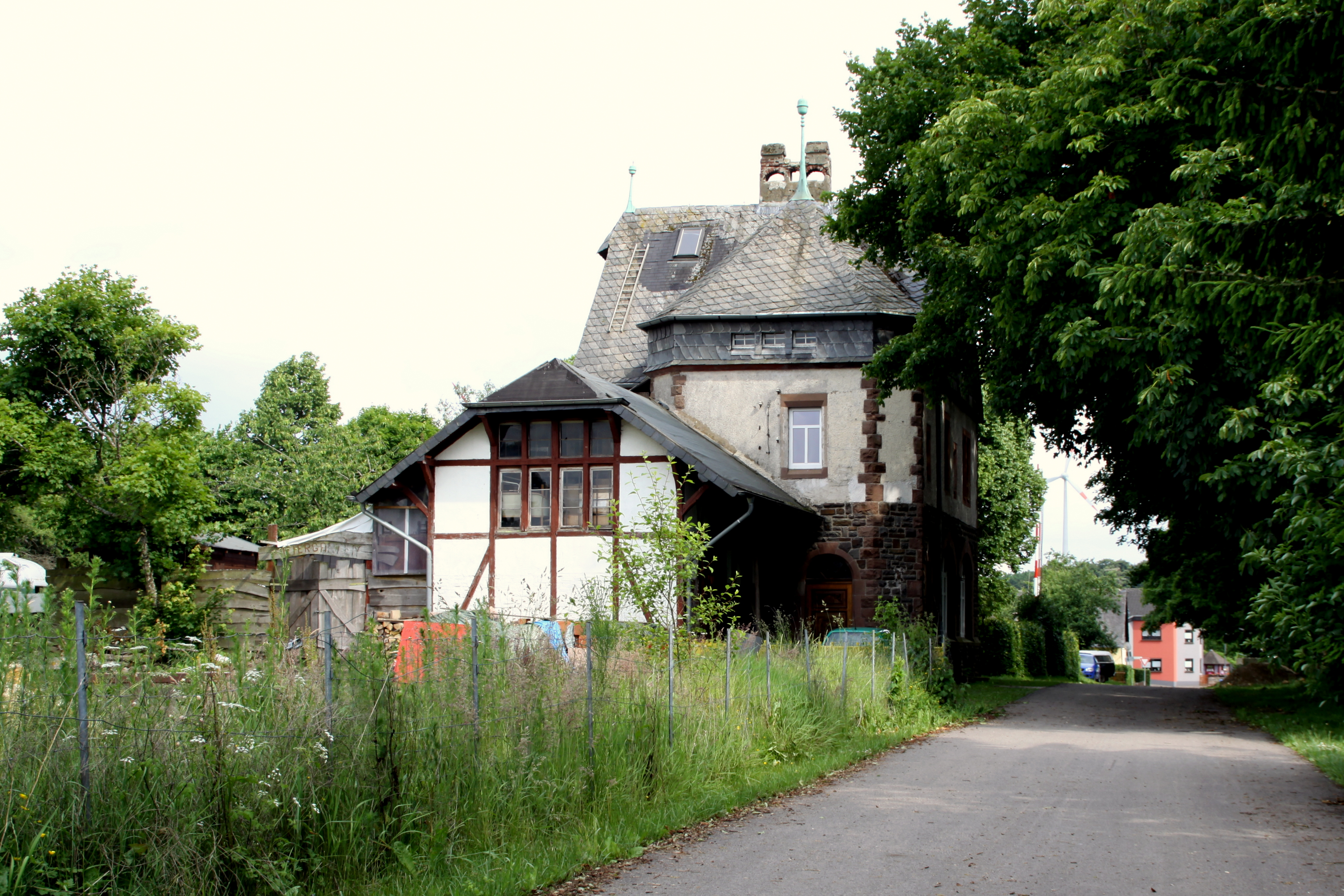 Déi fréier Gare zu Arzfeld